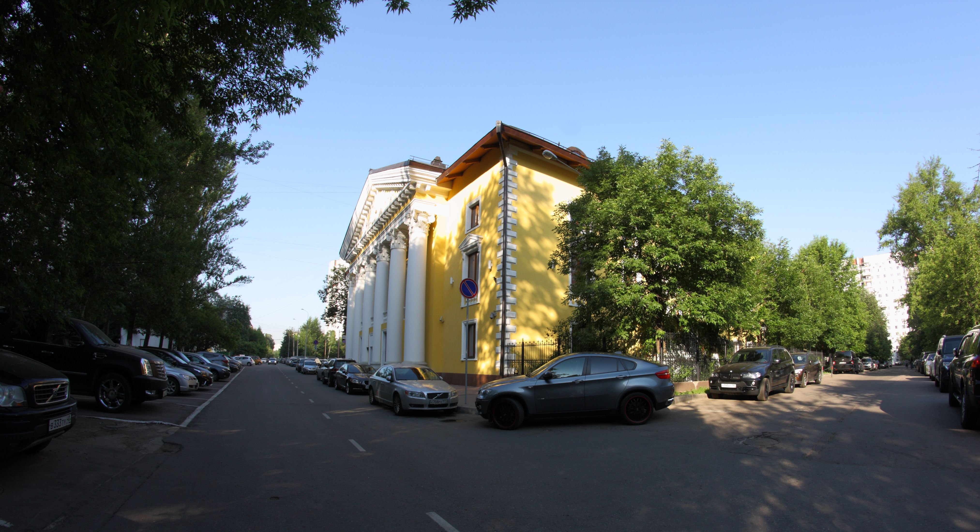 Москва, ул. Кедрова, 5а. Здание бывшего ДК "Новатор"